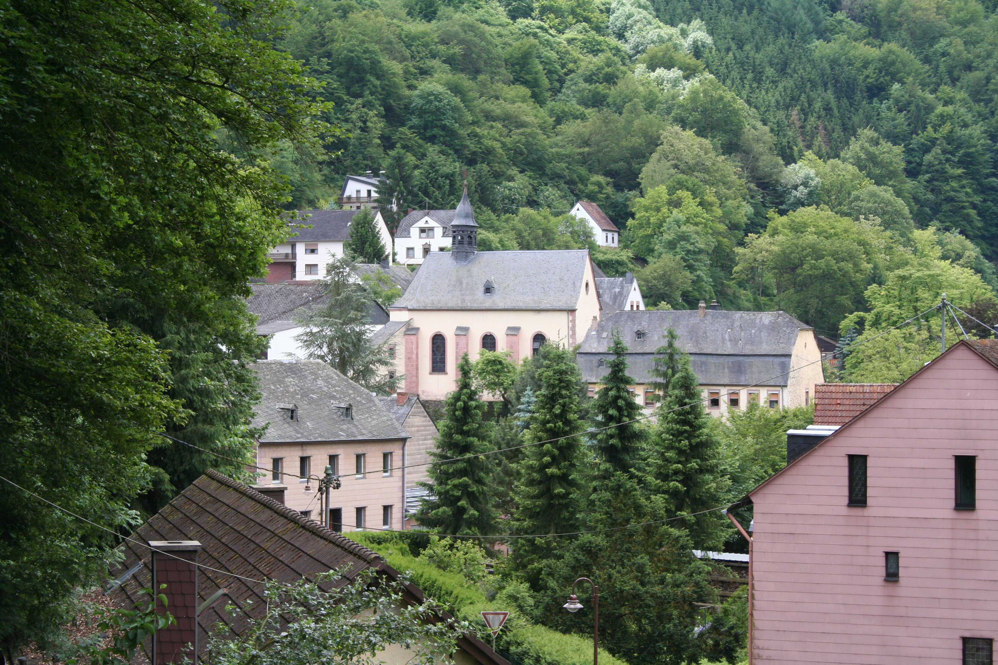 Auw an der Kyll mit der Wallfahrtskirche Maria Himmelfahrt